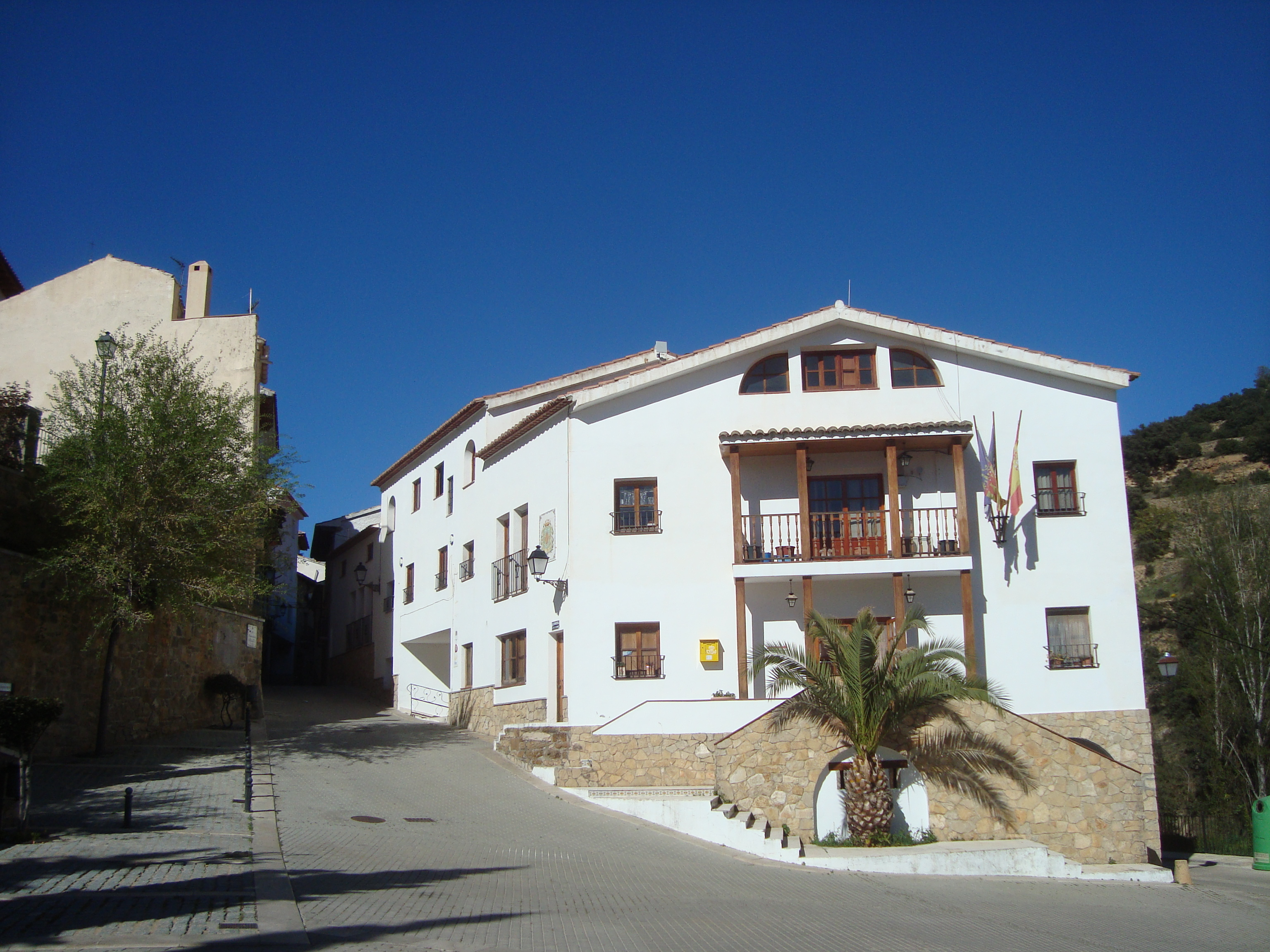 Ayuntamiento de Cortes de Arenoso (Castellón)